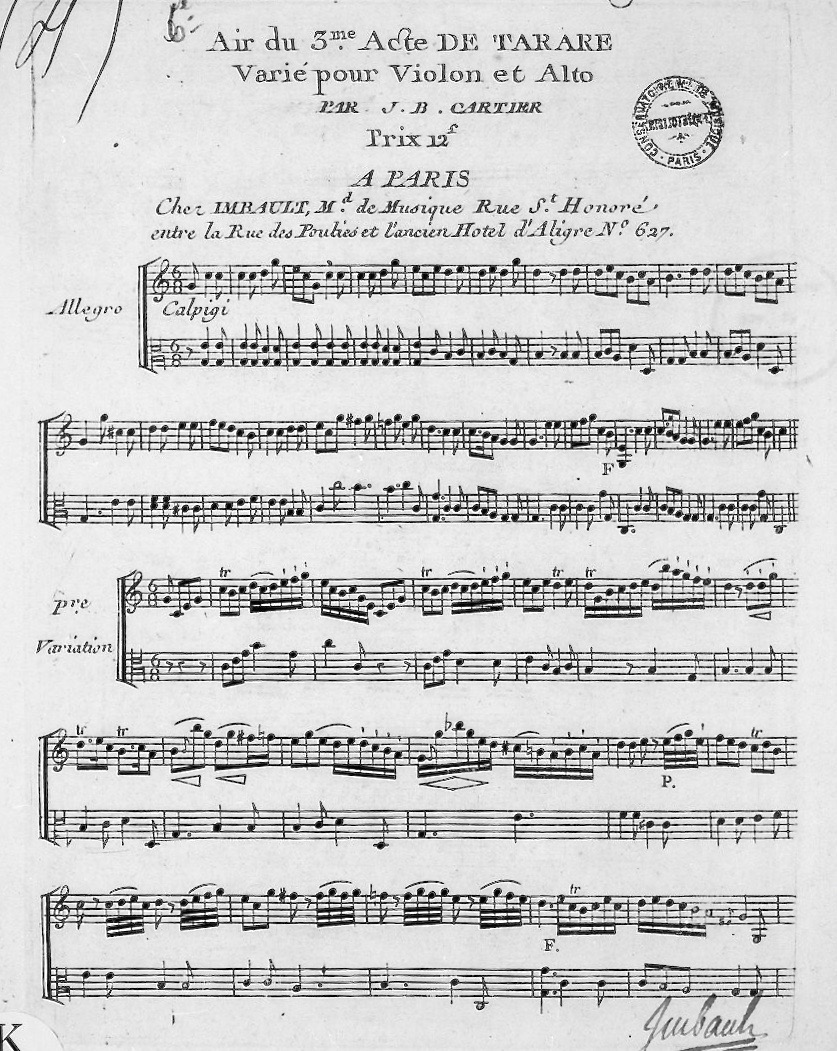 Jean-Baptiste Cartier (1765–1841): Arie von Calpigi aus dem 3. Akt der 1787 uraufgeführten Oper Tarare von Pierre-Augustin Caron de Beaumarchais (Libretto) und Antonio Salieri (Musik), bearbeitet für Violine und Bratsche. Bibliothèque nationale de France.